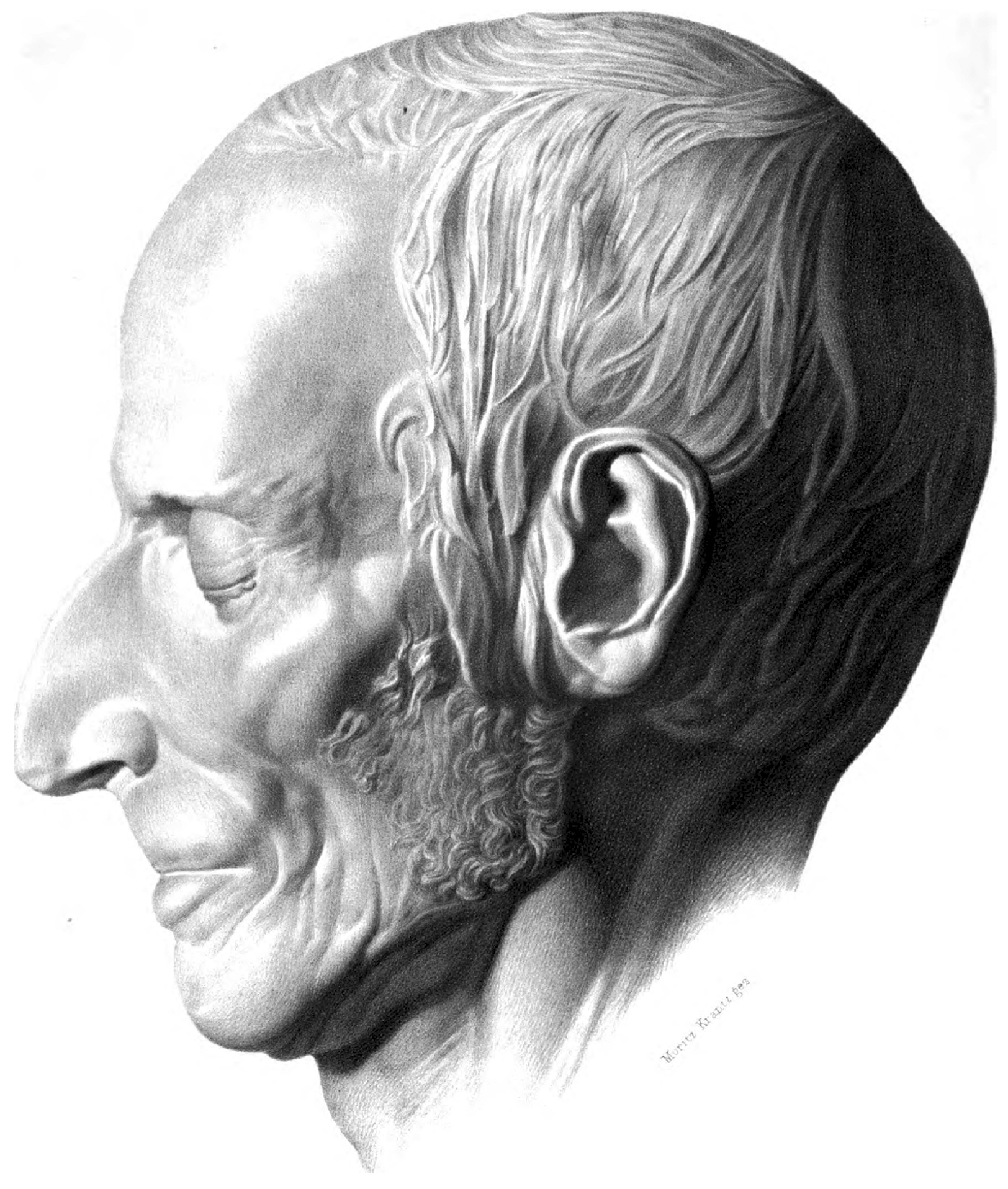 Totenmaske von Lorenz Oken